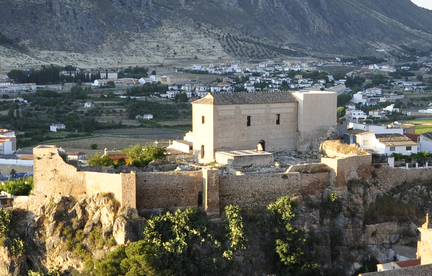 Vista general del casco antiguo y murallas de Loja